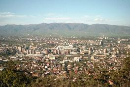 Skopje view from Vodno Mountain